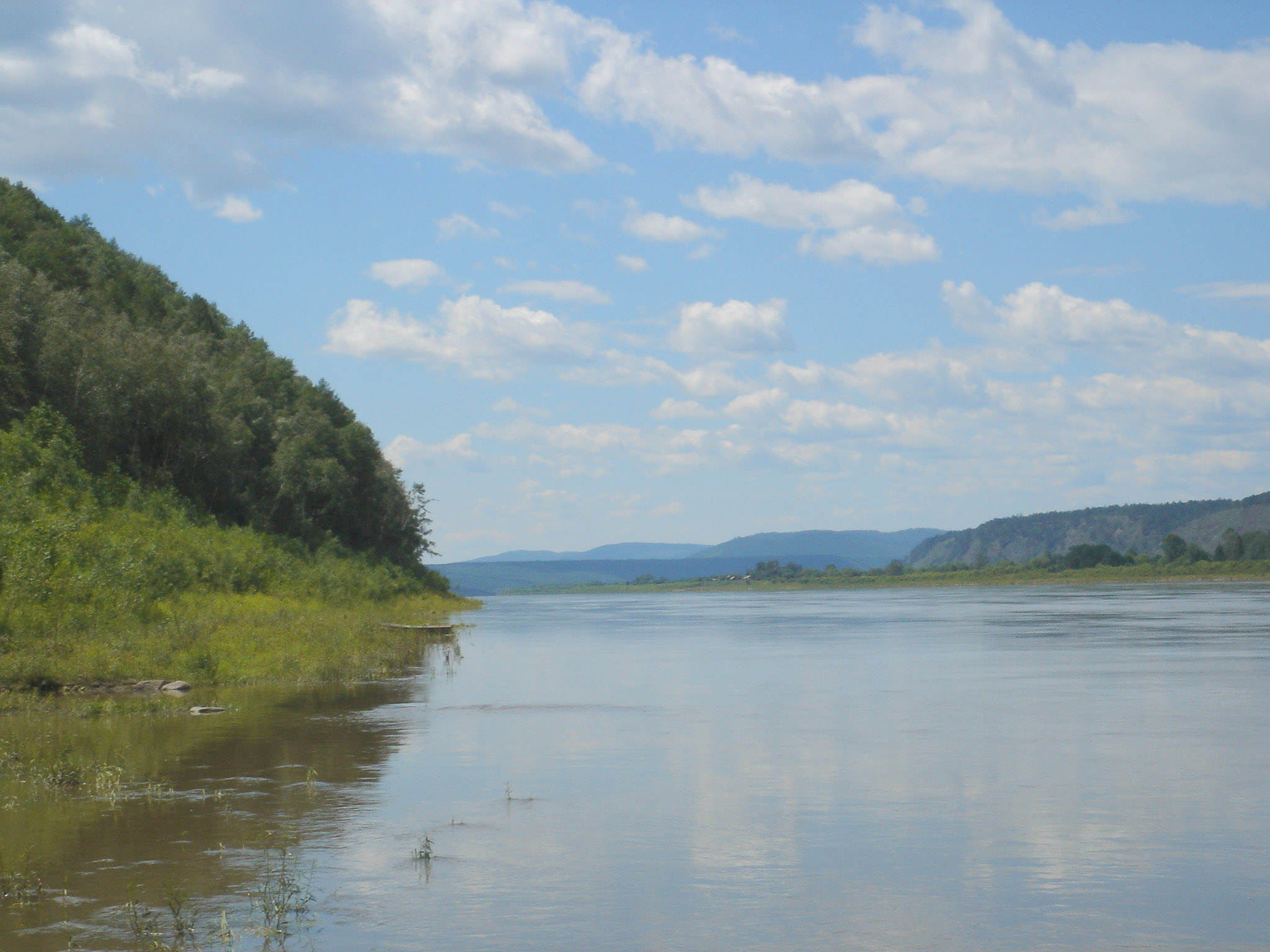 黑龙江源头（石喀勒河与额古纳尔河汇合处），维基人Refrain于2005年在源头中国辖区拍摄。